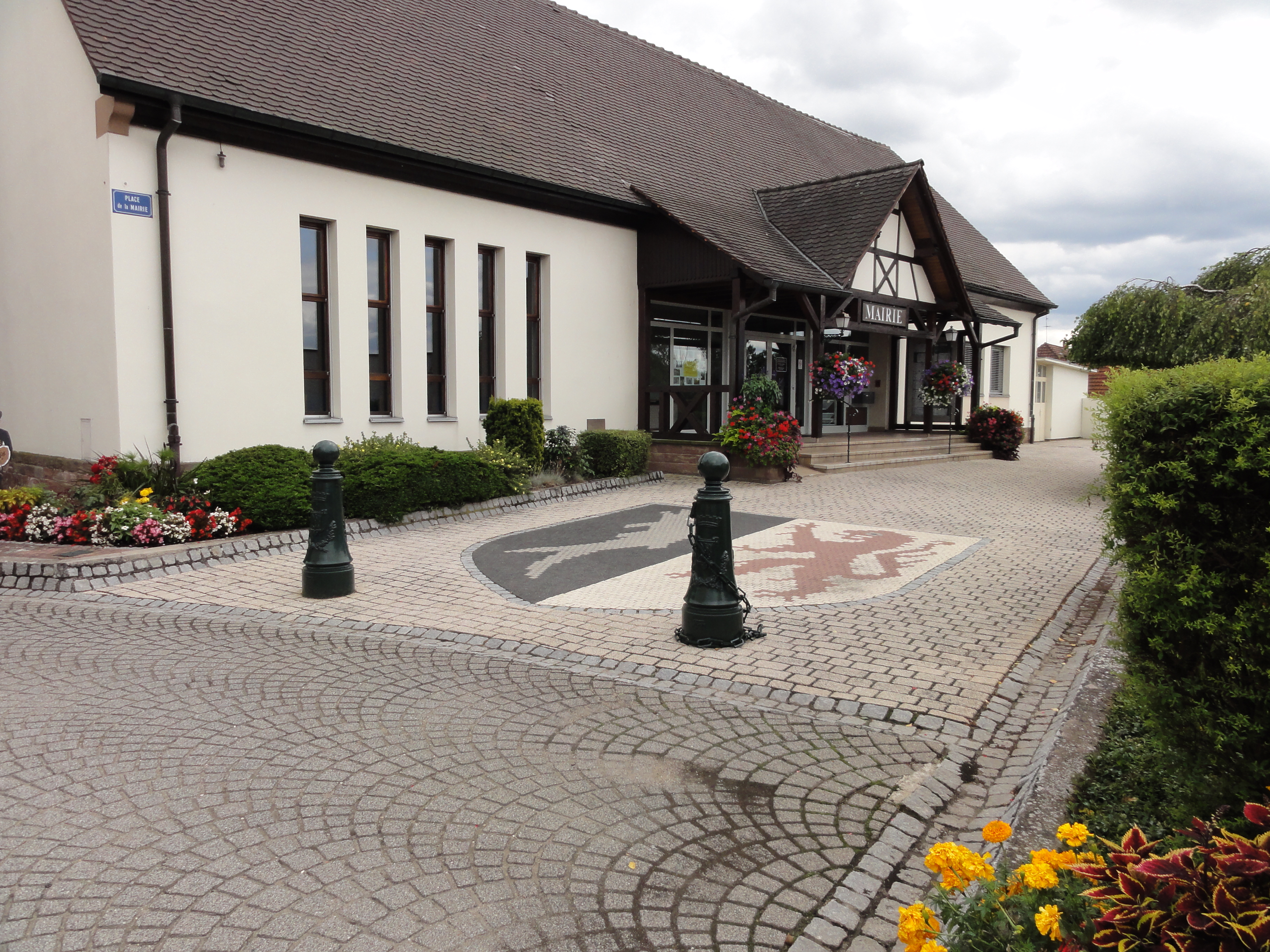 Alsace, Bas-Rhin, Munchausen, Mairie.